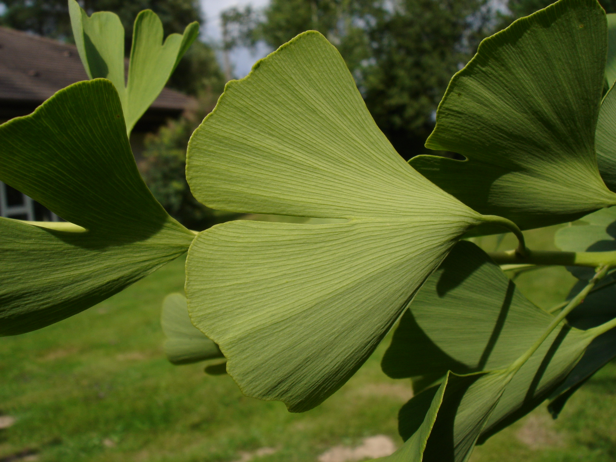 cliché pris sur un jeune Ginkgo biloba dans le parc de l'abbaye d'Autrey - Insee = 88021